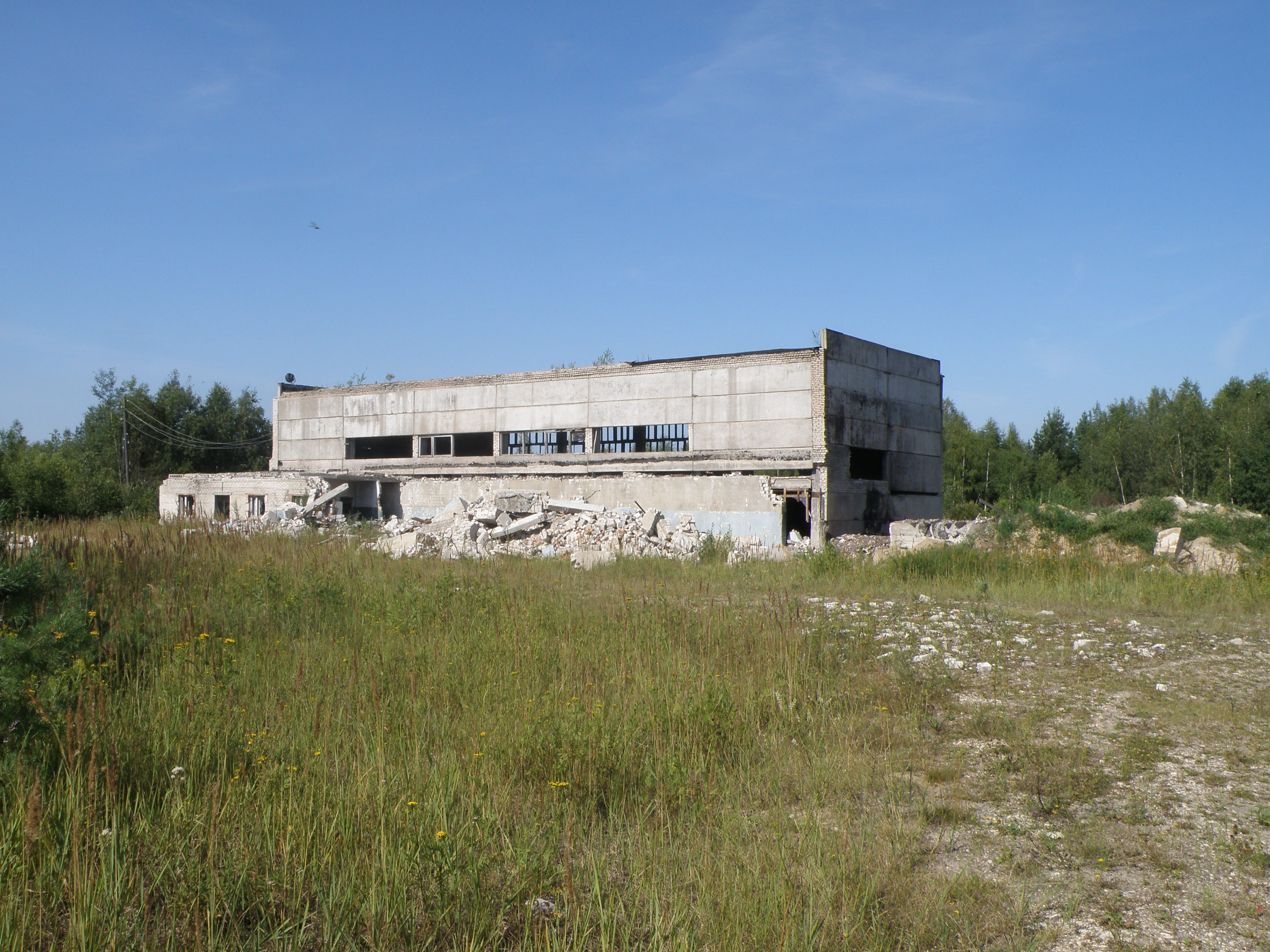 Промышленные развалины у Ильичёва